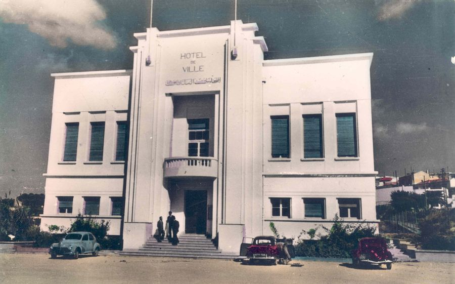 Municipalité du Kef